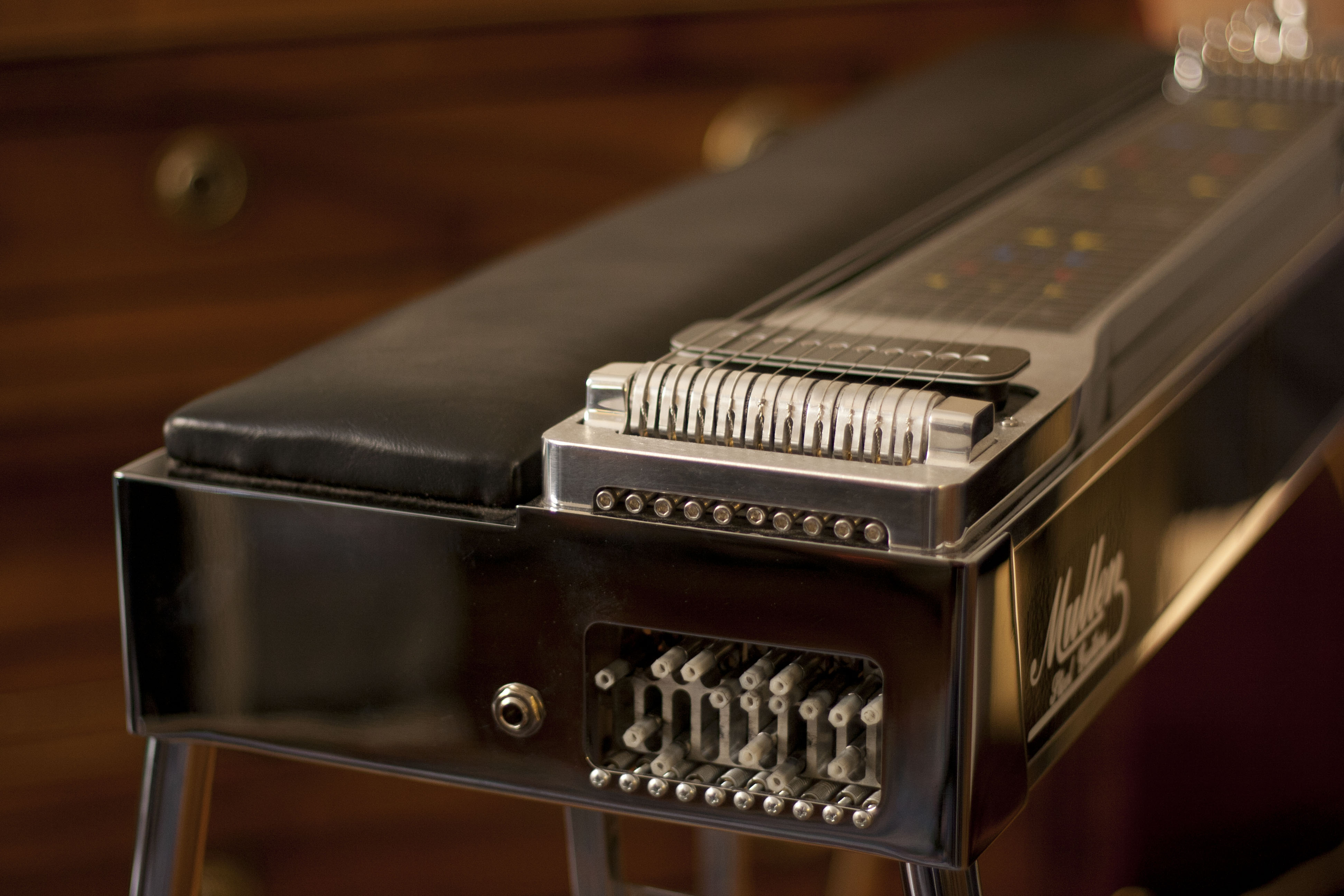 changer